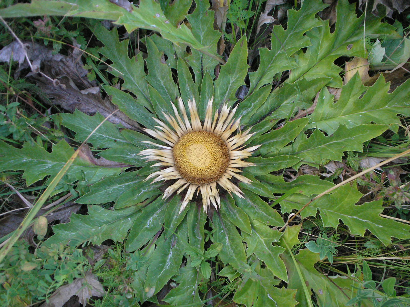 Терещуків яр